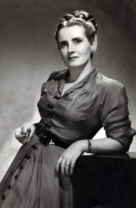 Rosa Markmann Reijer de González Videla (Taltal, 30 de julio de 1907 - Santiago, 12 de junio de 2009) fue primera dama de la República de Chile entre 1946 y 1952, durante el mandato de su marido, el presidente Gabriel González Videla.